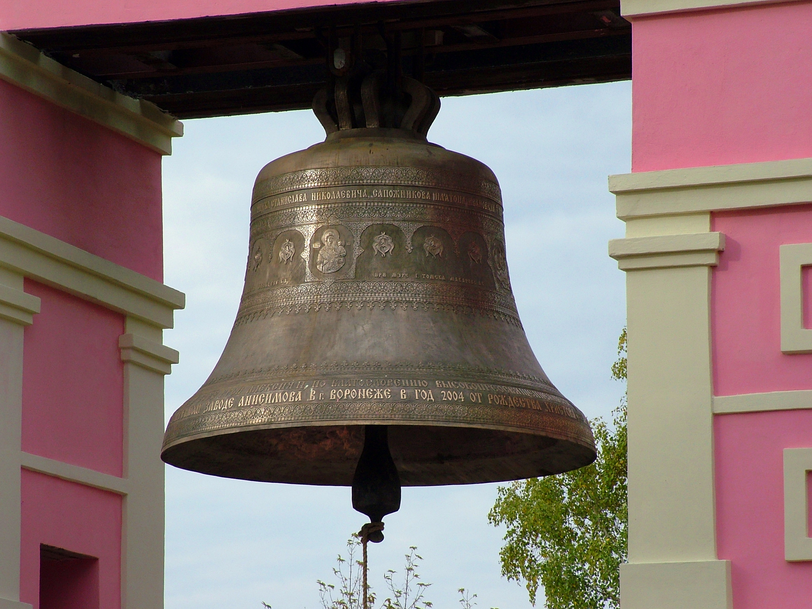 Колокол в Воскресенской церкви г. Томска